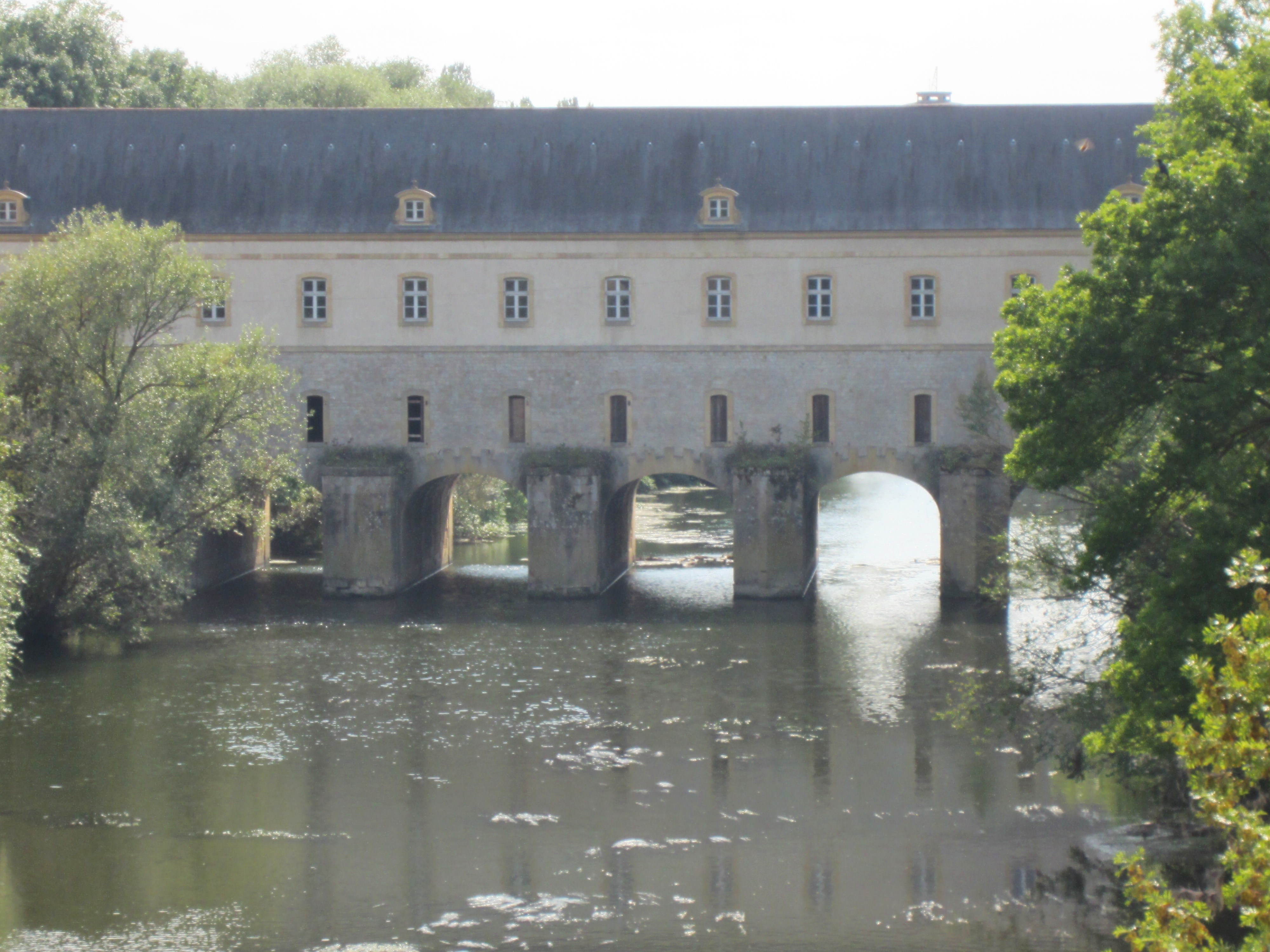 Description pont écluse Thionville Date26 August 2011Sourcemon appareil photoAuthorAimelaimePermission (Reusing this file) pont écluse Thionville